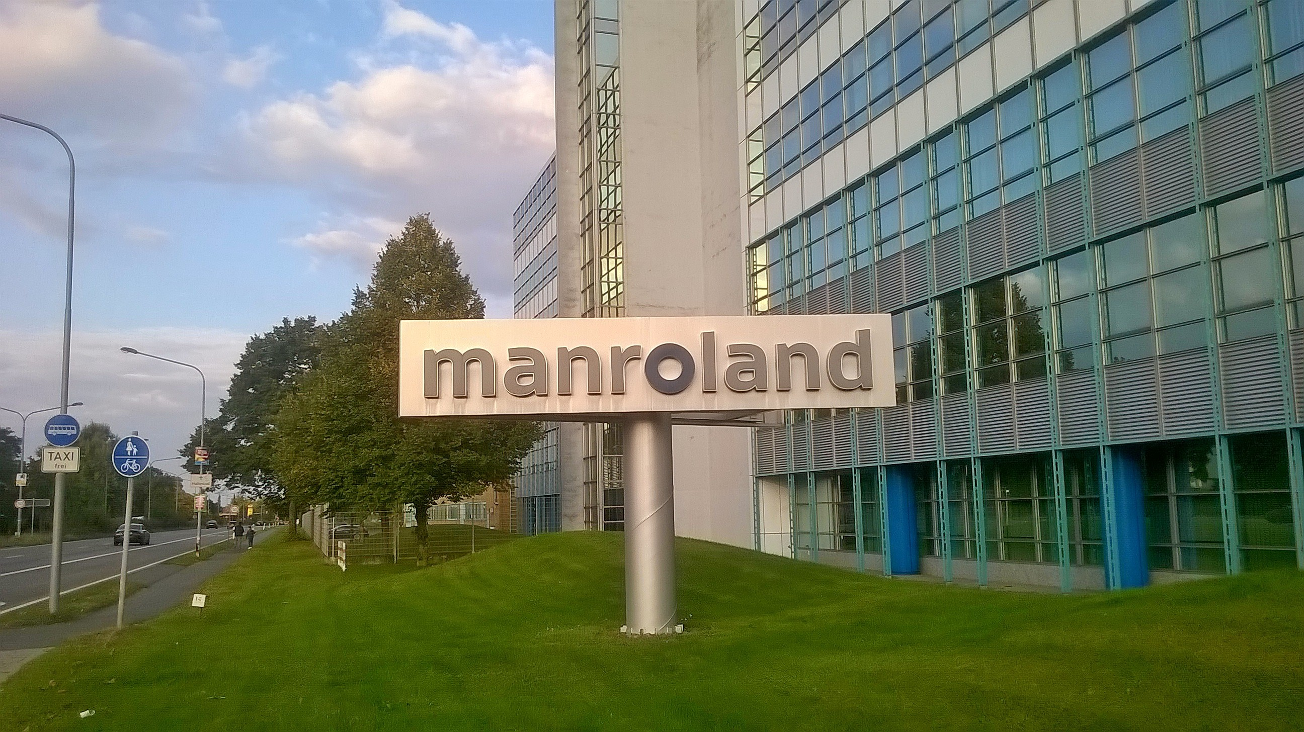 Manroland am Standort Offenbach: Senefelderhaus